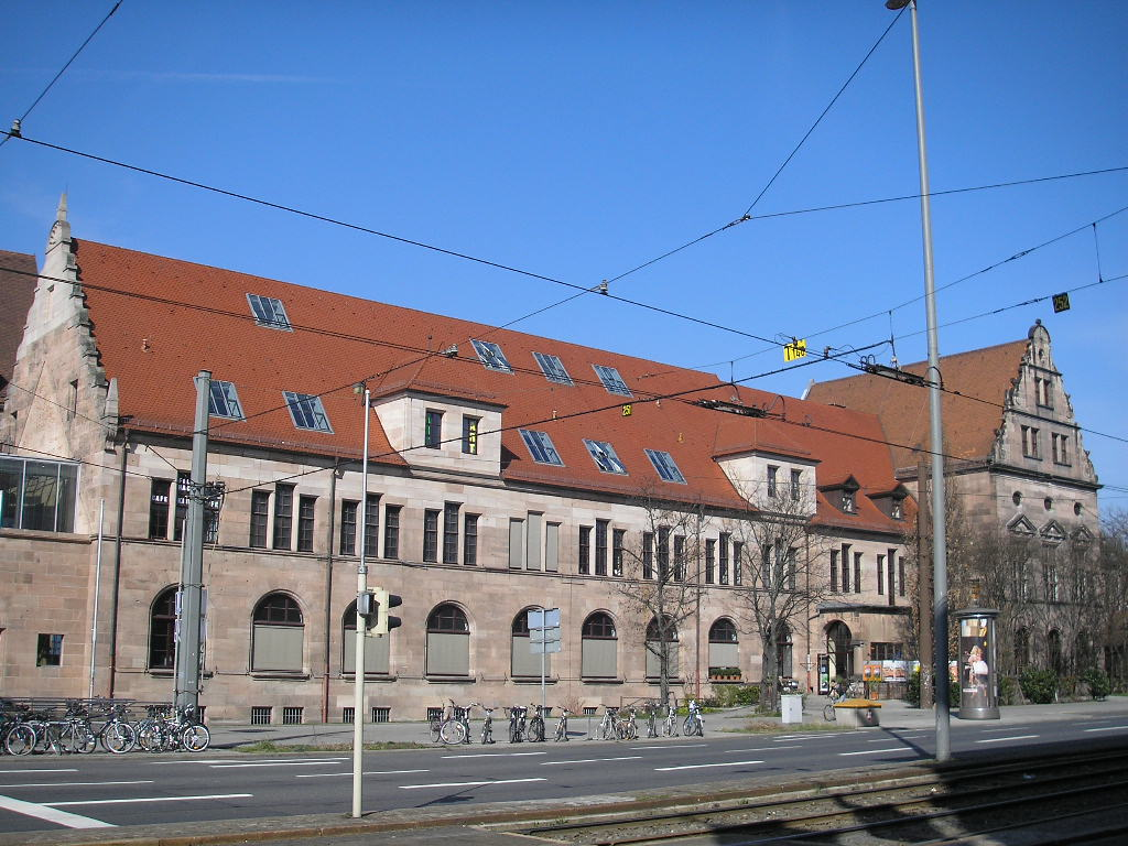 K4 (Kulturzentrum) at the Königstormauer in Nuremberg